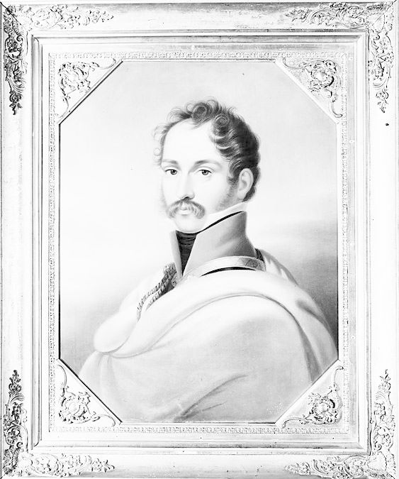 Karl Thomas, 5. Fürst zu Löwenstein-Wertheim-Rochefort